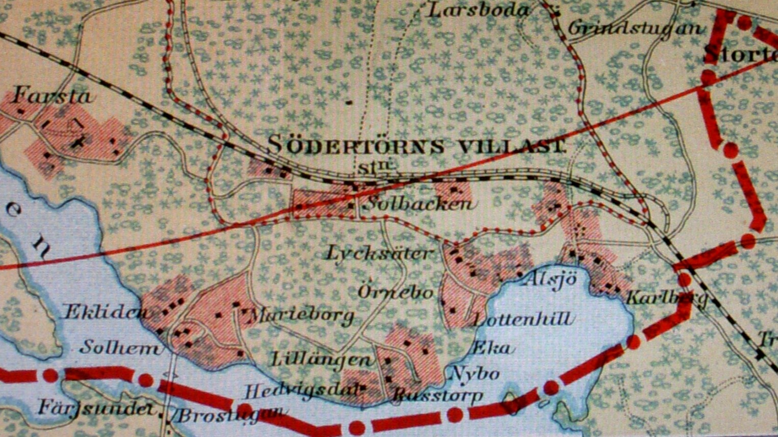 Stockholmskarta med omnejd fån 1912, del som visar Södertörns villastad